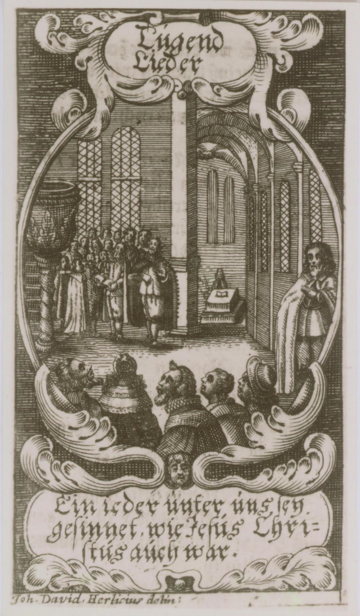 engraving by J. D. Herlicius, Eisenach song book, 1673, kept in Bach House, Eisenach (de)